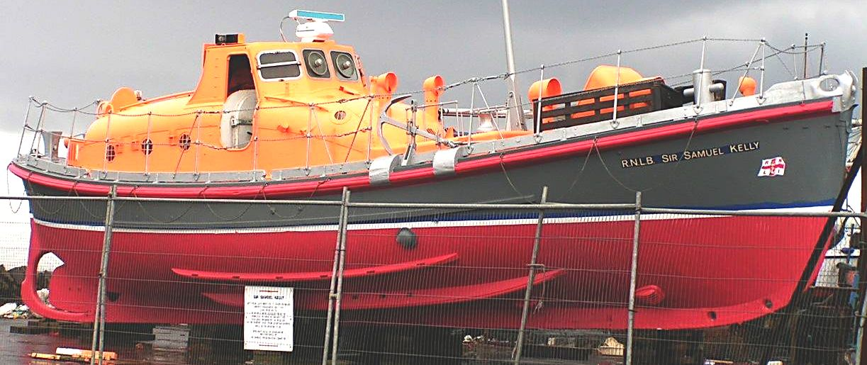 RNLI lifeboat Sir Samuel Kelly